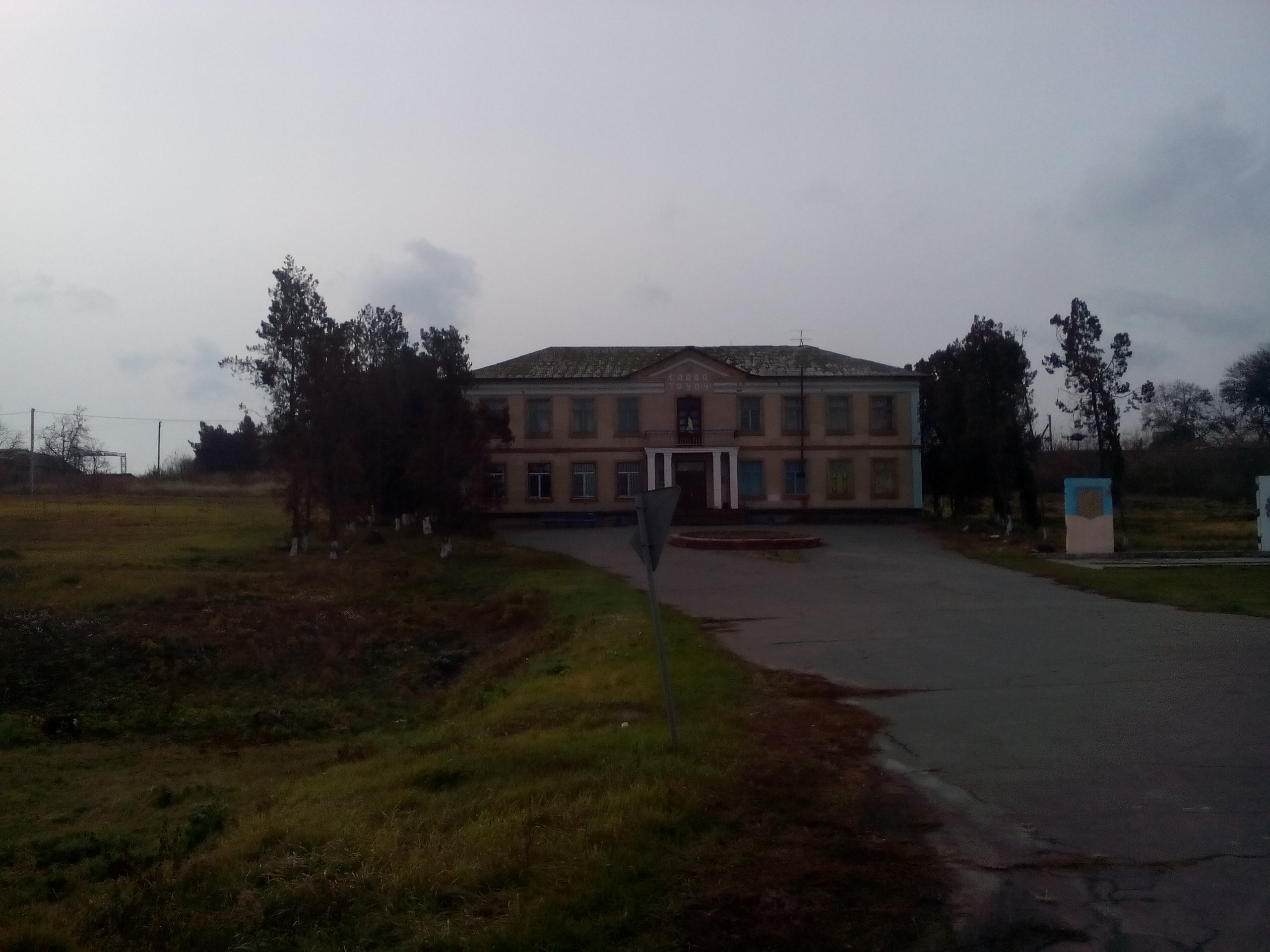 Село Успенка Онуфріївського району Кіровоградської області